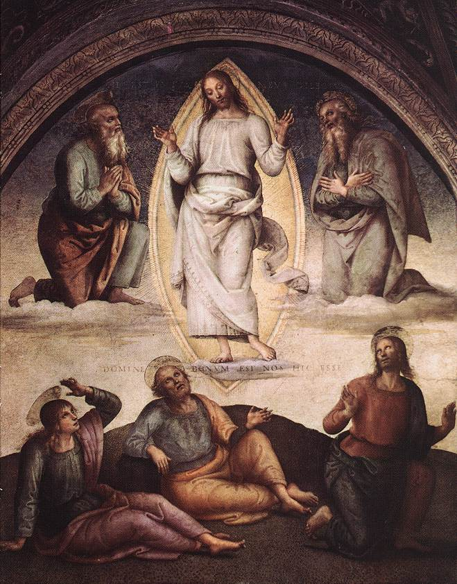 PERUGINO, Pietro The Transfiguration Fresco, 226 x 229 cm Collegio del Cambio, Perugia